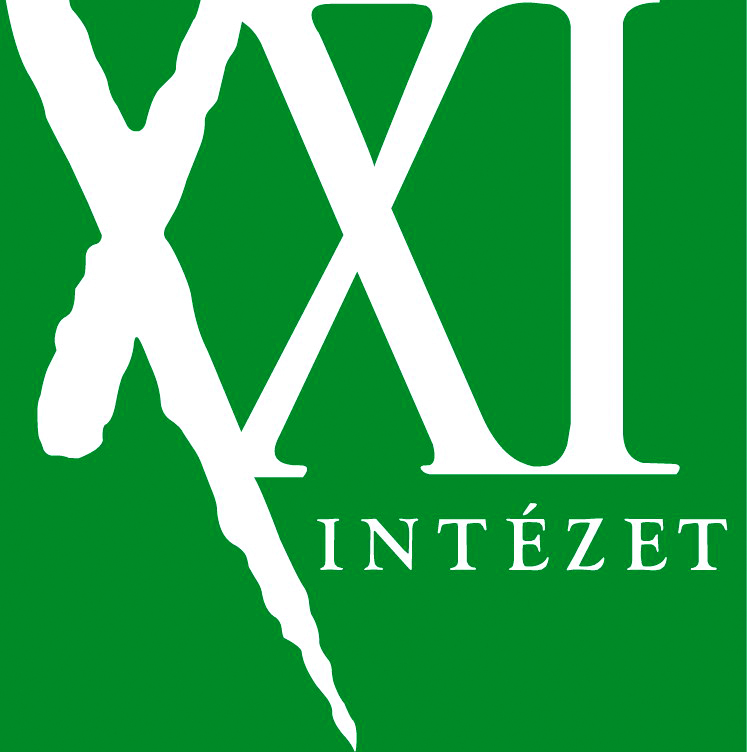 XXI. Század Intézet logo